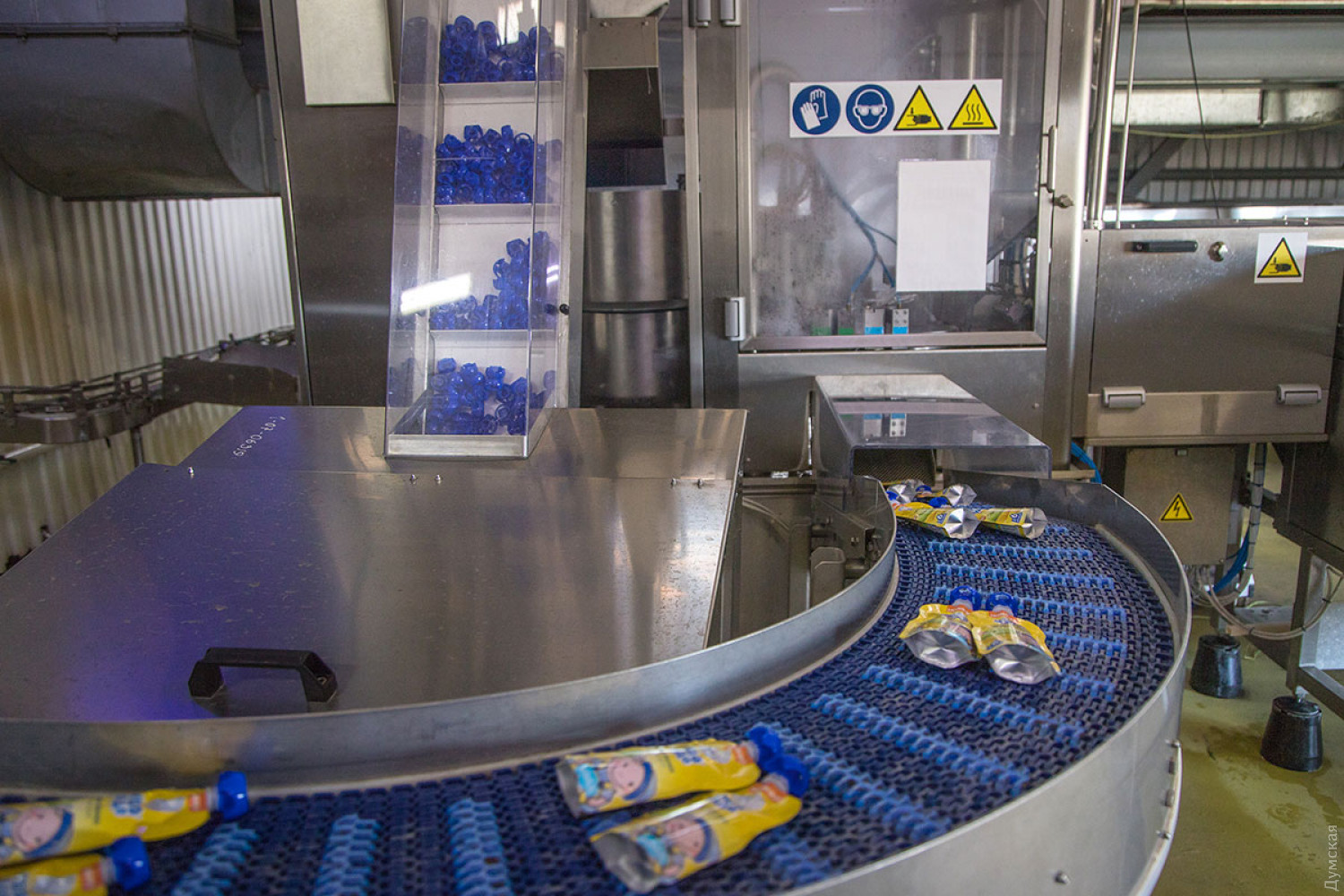 Роботизированная линия розлива